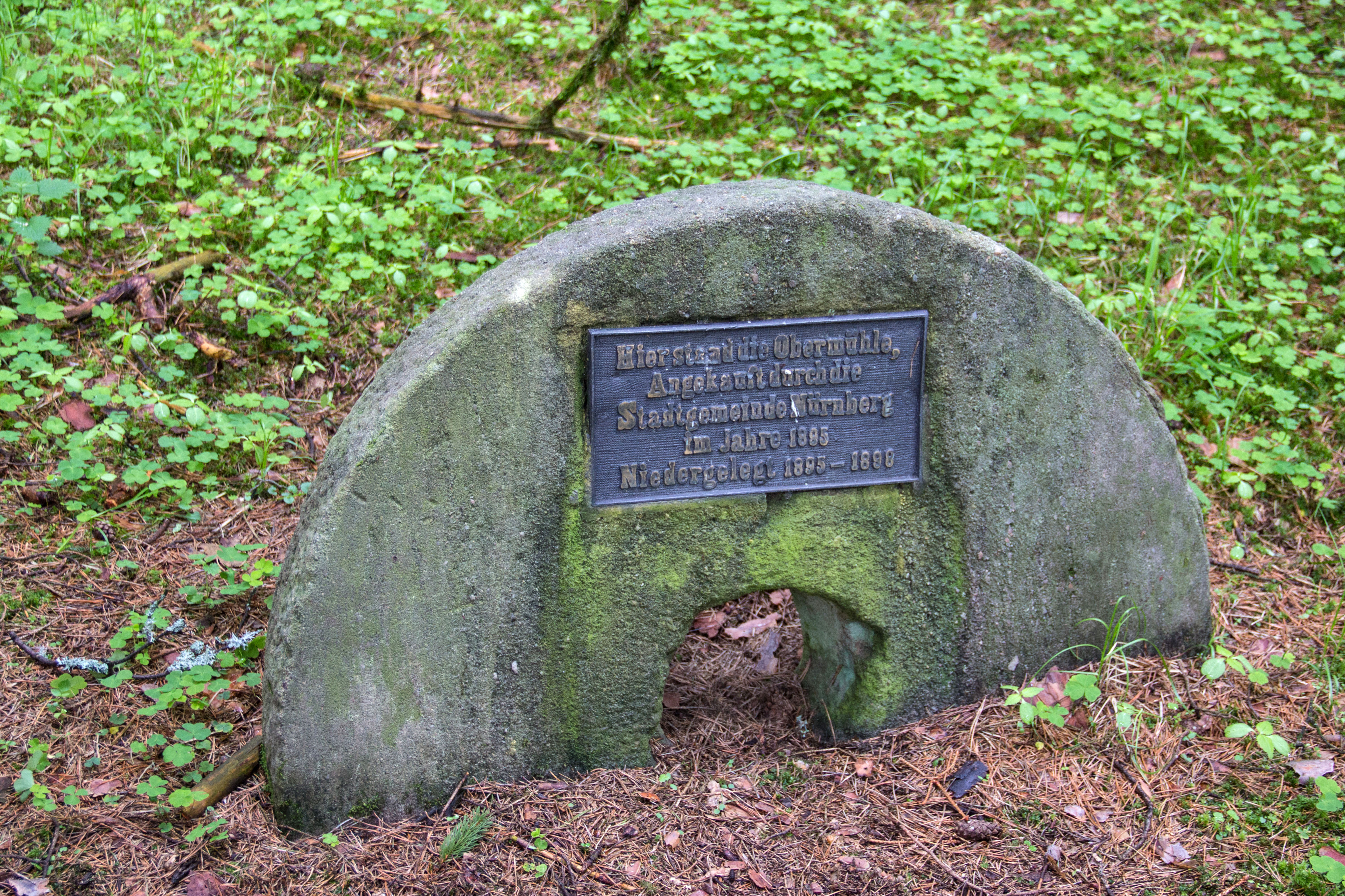 Ursprungtal, Mühlenstein Obermühle